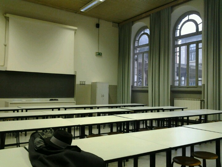 Un'aula del padiglione sud della sede di Città Studi del Politecnico di Milano